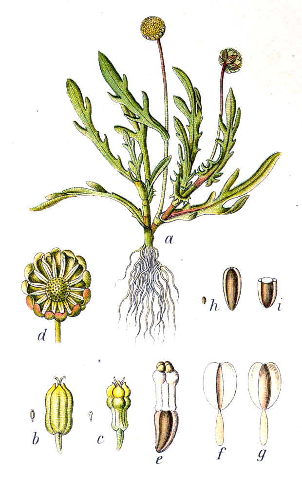 Cotula coronopifolia L. Original Caption Krähenfussblättrige Laugenblume, Cotula coronopifolia